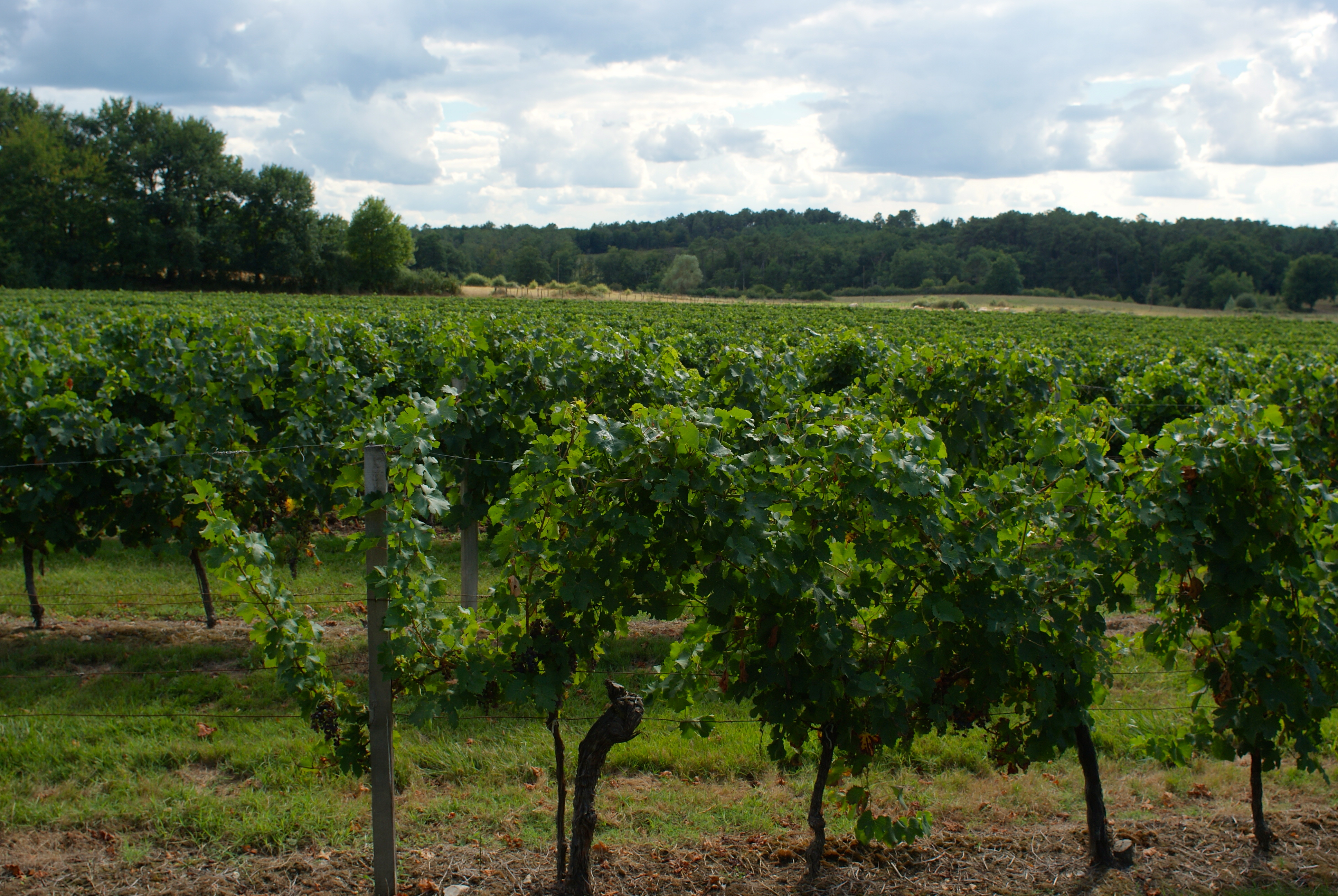 Vignoble de l'IGP Agenais